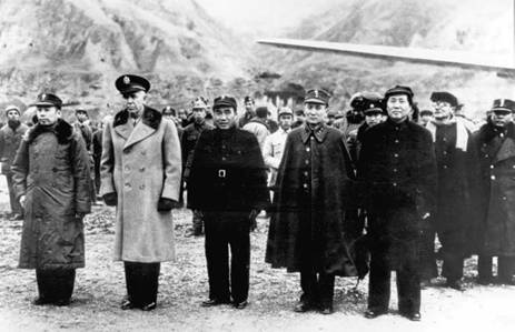 Marshall in yanan